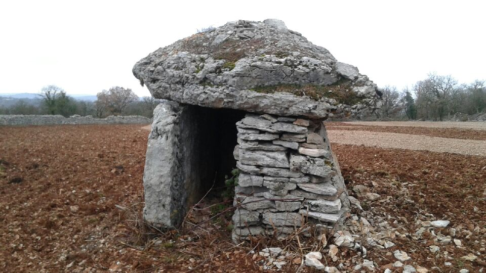 Dolmen mégalithique classé patrimoine Français